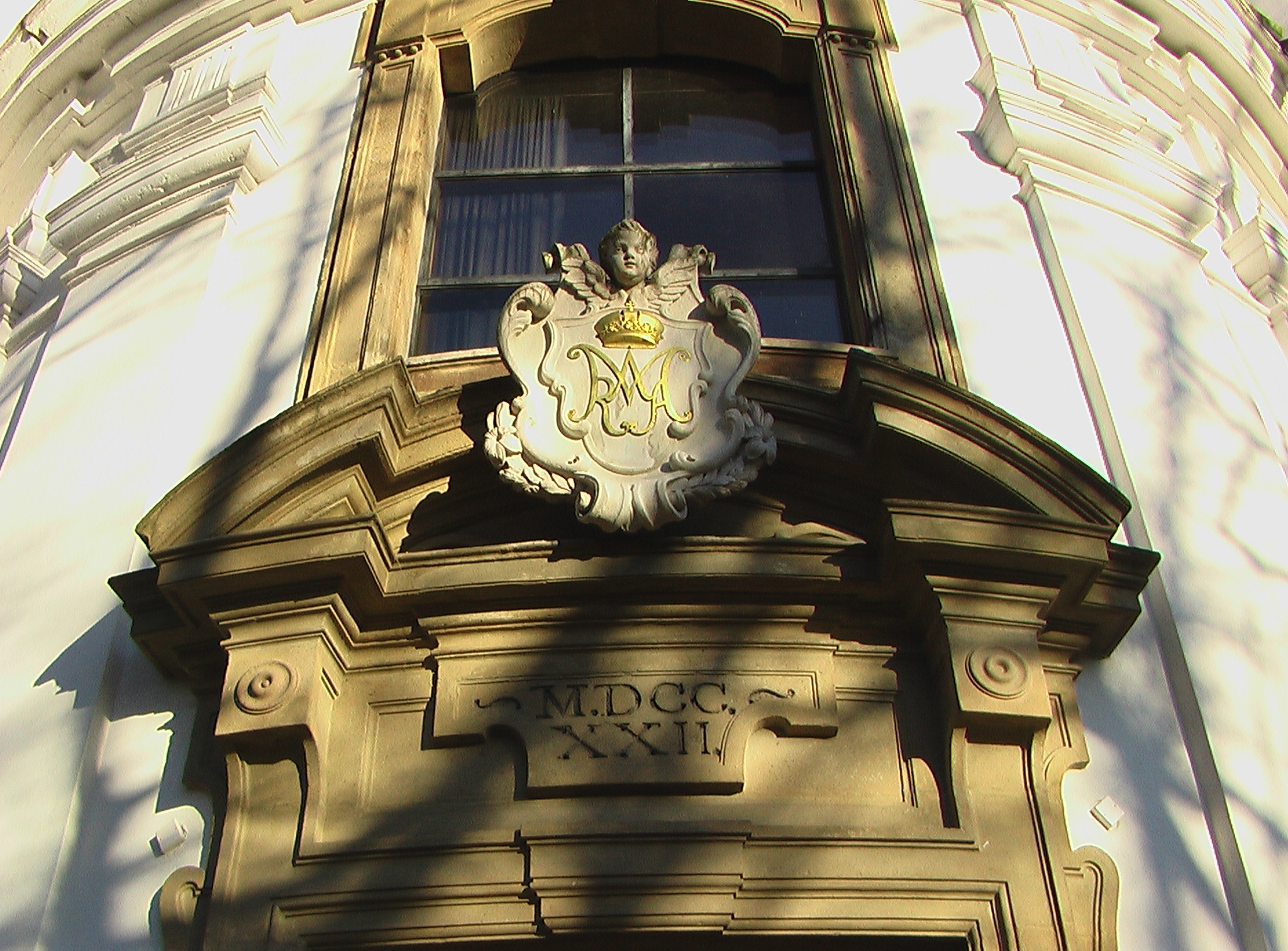 Lechwitzer Wallfahrtskirche Mariae Heimsuchung - Eingangsportal